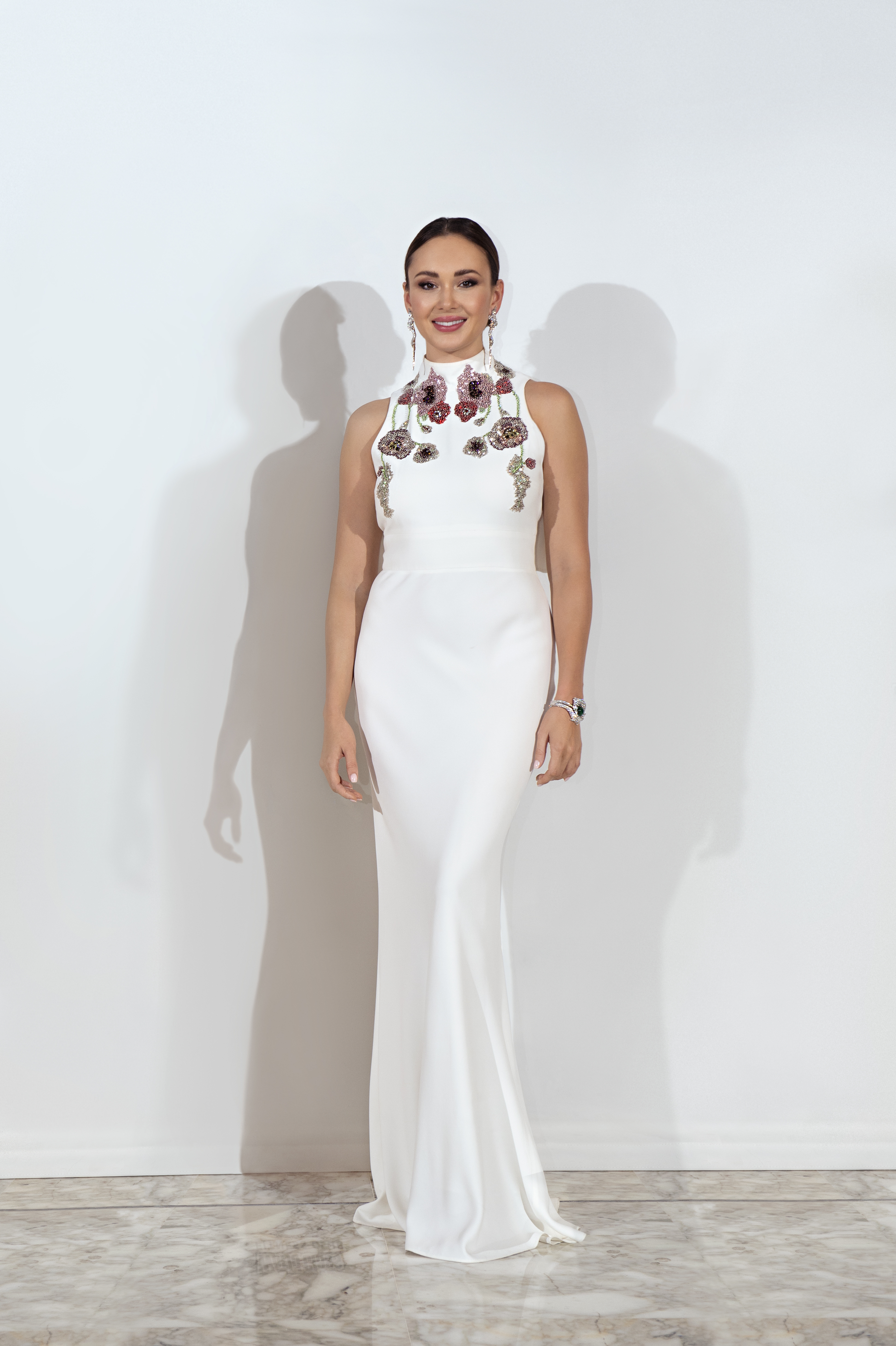 Aida Garifullina Gala Russe Monaco 2019 photographiée par Gil Zetbase